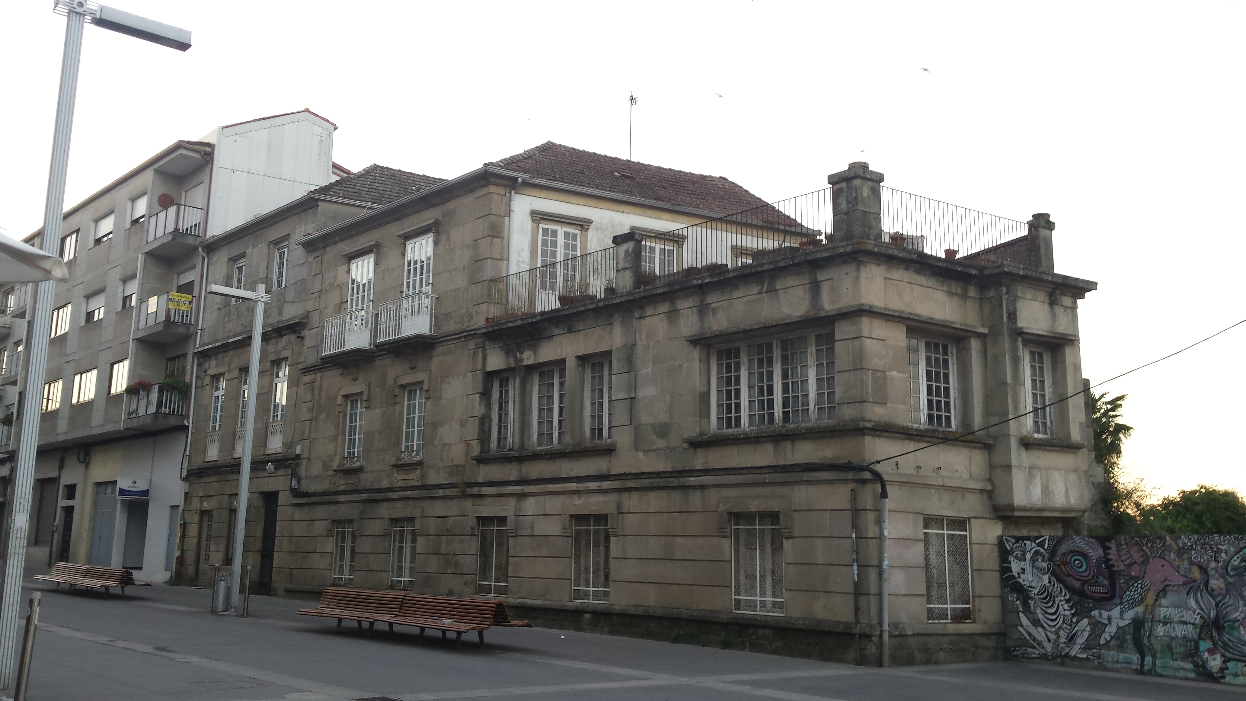 Casa natal de José Filgueira Valverde, na rúa do Arcebispo Malvar, en Pontevedra.